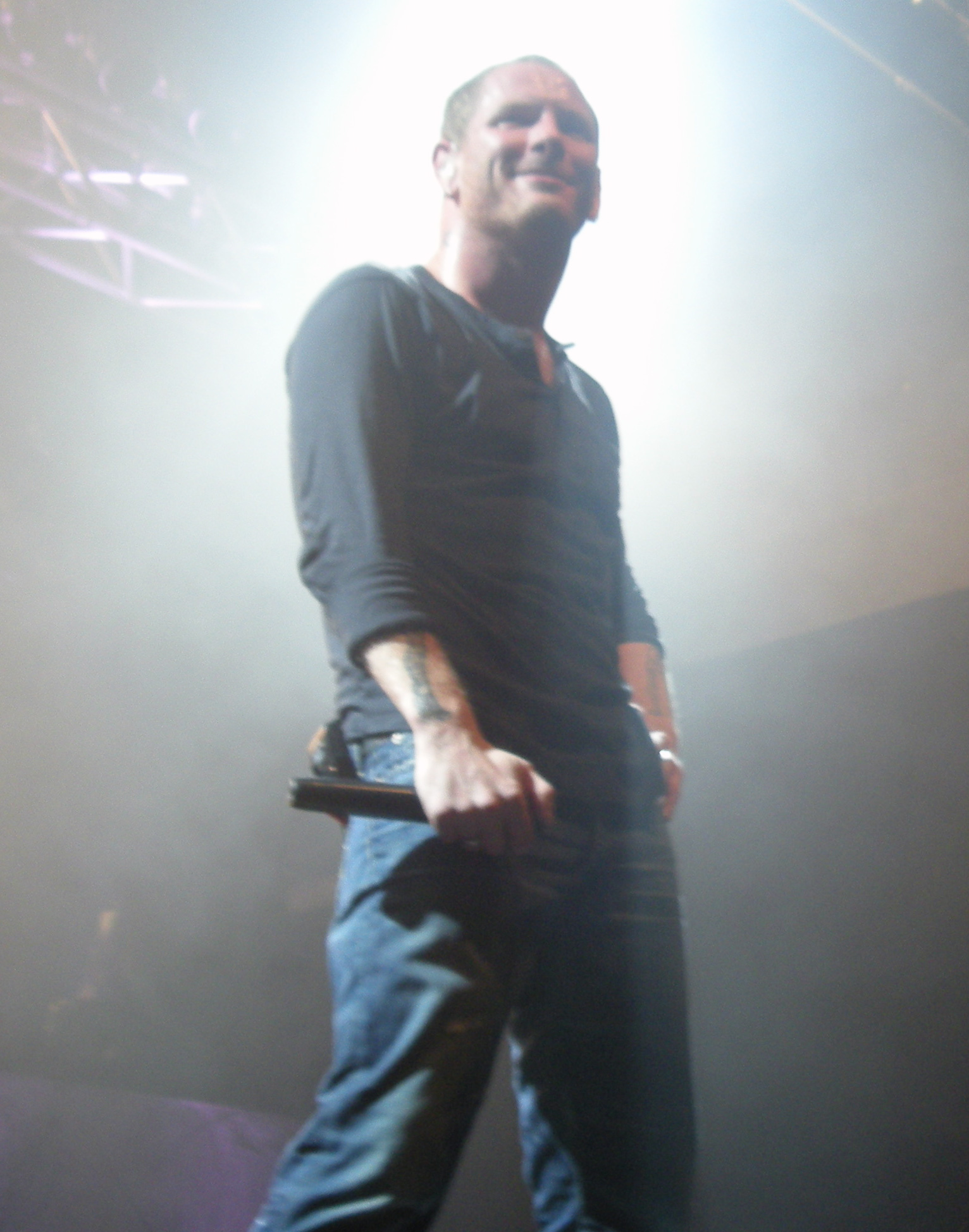 Corey Taylor con gli Stone Sour a Trezzo sull'Adda (Mi)